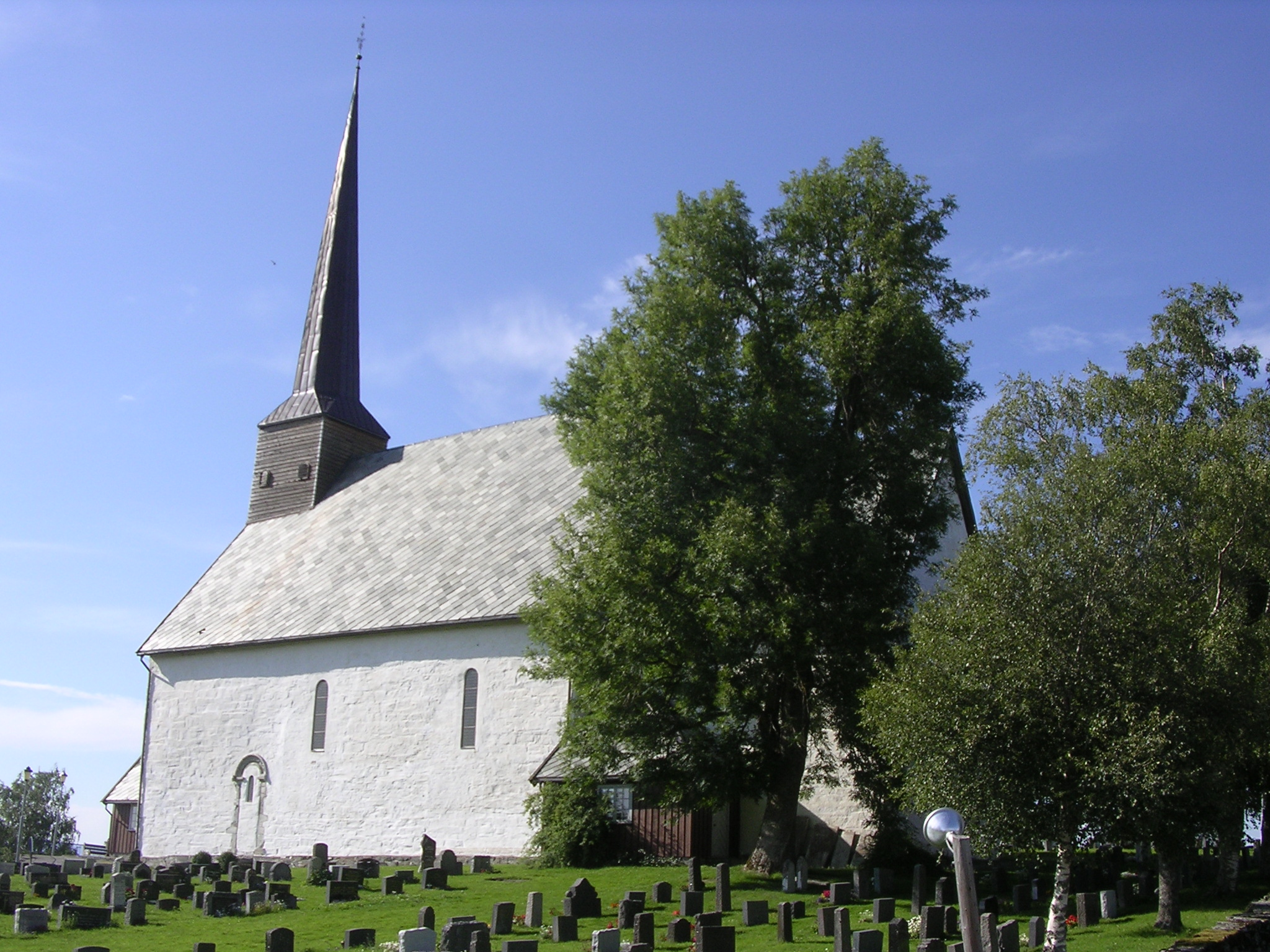 Mære kirke i Steinkjer kommune, Nord-Trøndelag